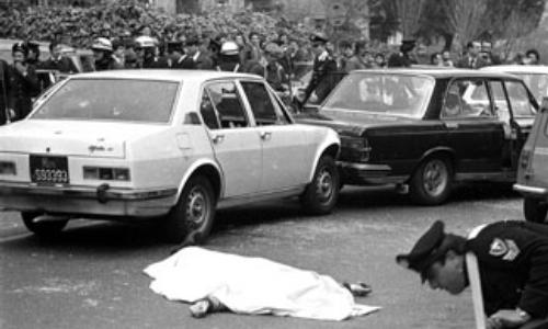 Foto di via Fani a Roma il 16 marzo 1978 pochi minuti dopo l'agguato delle Brigate Rosse Categoria: Caso Moro Licensing Categoria:Caso Moro